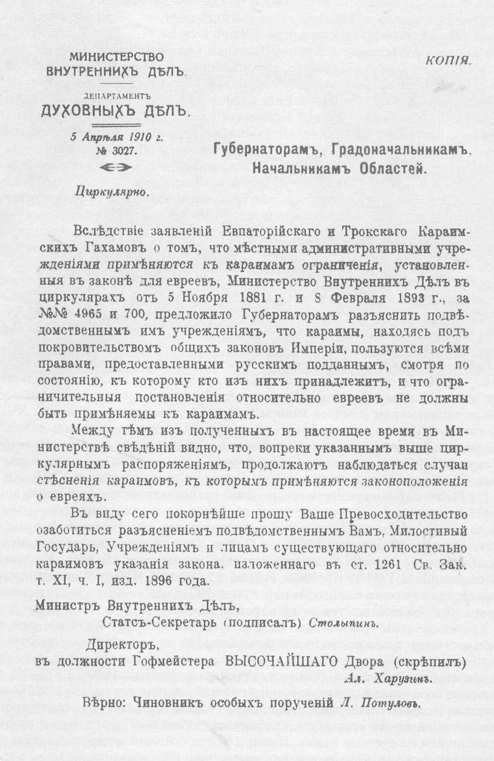 Циркуляр министра П.А. Столыпина о караимах. 1910 год.